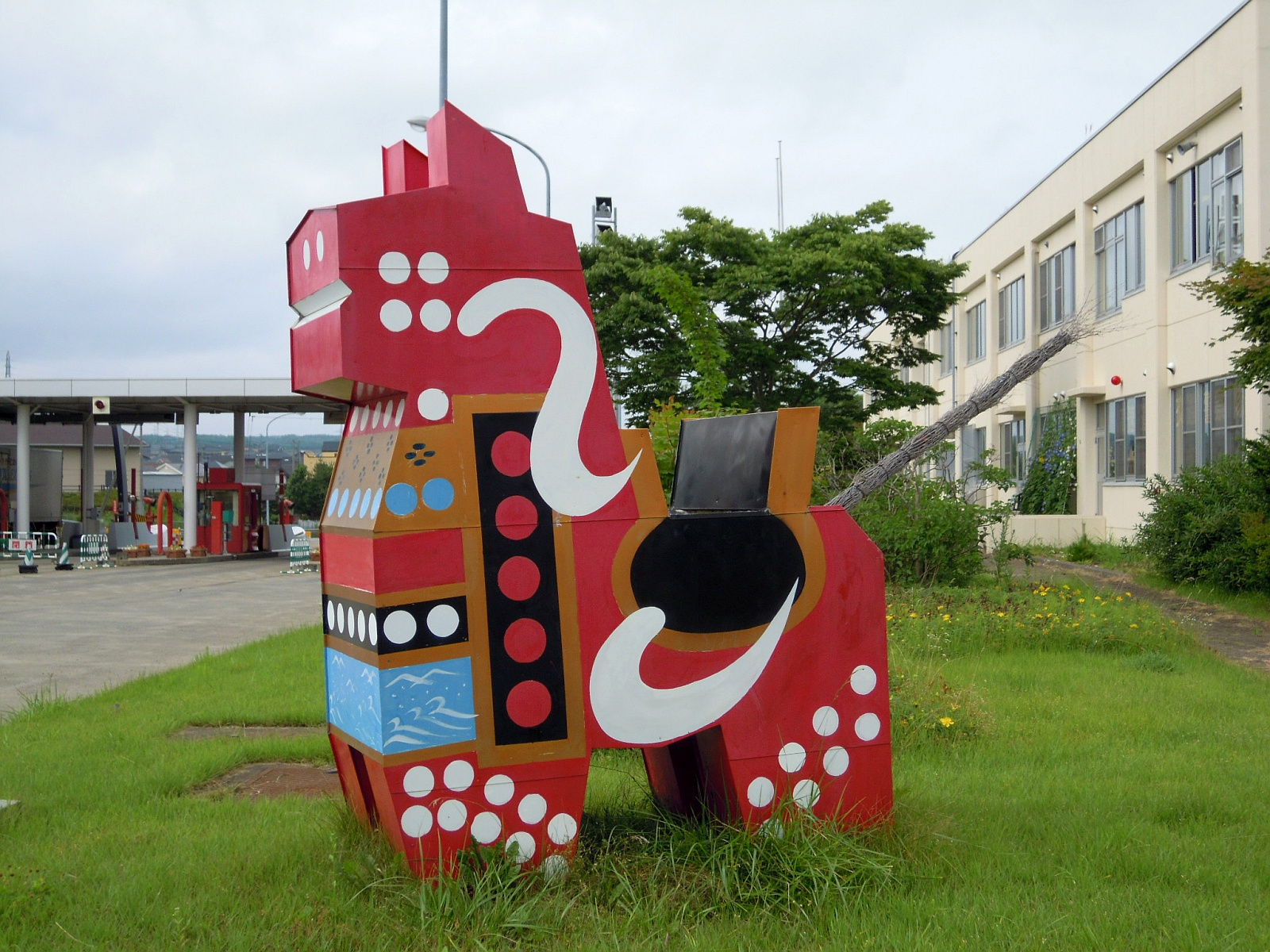 青森県八戸市の八戸自動車道八戸インターチェンジ内にある八幡馬のオブジェ